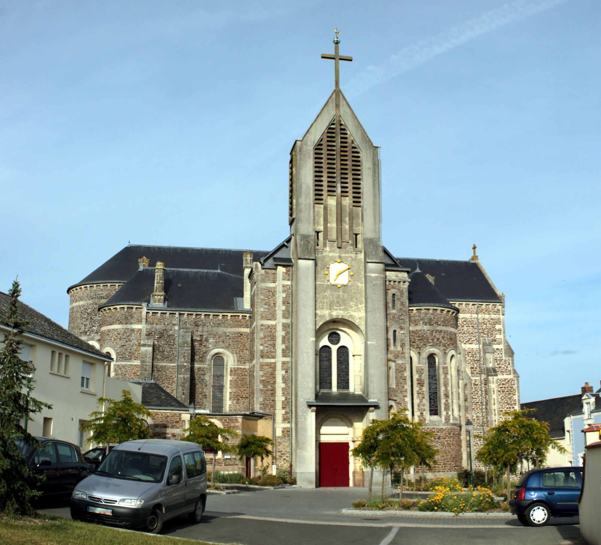 Église Saint-Hermeland, VIII°-IX°-1900, Saint-Herblon. Cette photo n'a pas d'EXIFcar c'est un montage panoramique de 3 photos. Peux fournir les originaux si besoin.